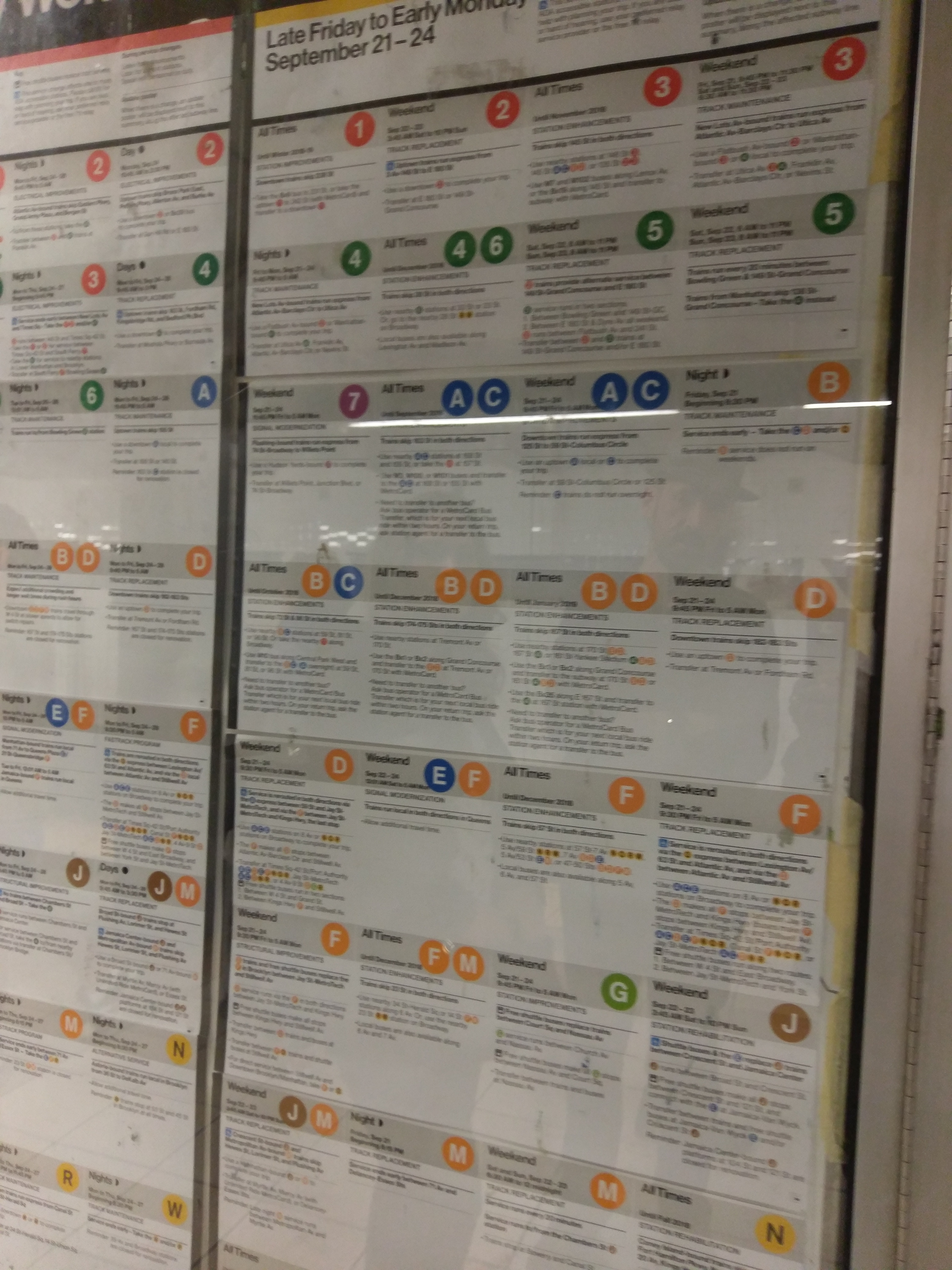 IMAG3099